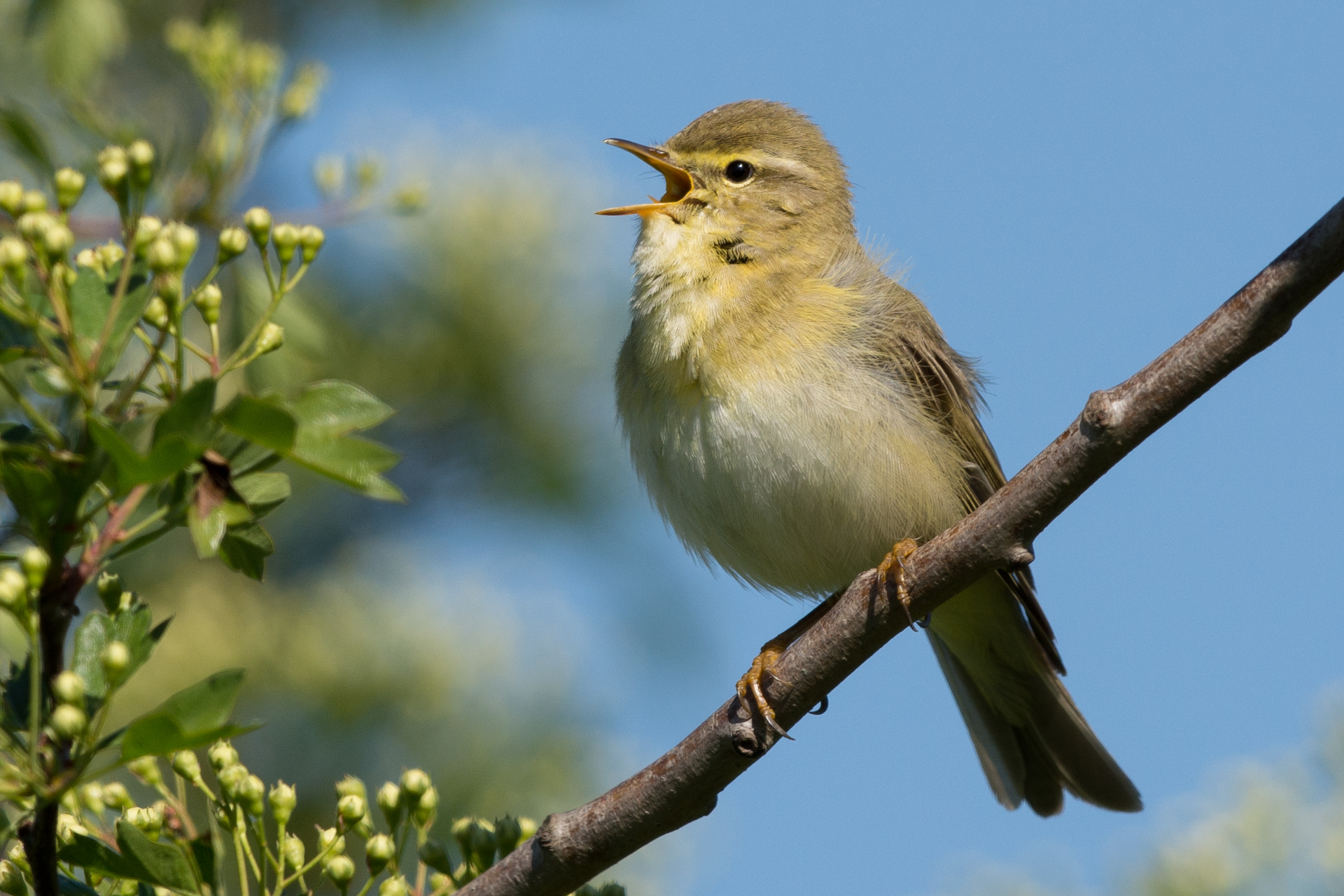 Fitis